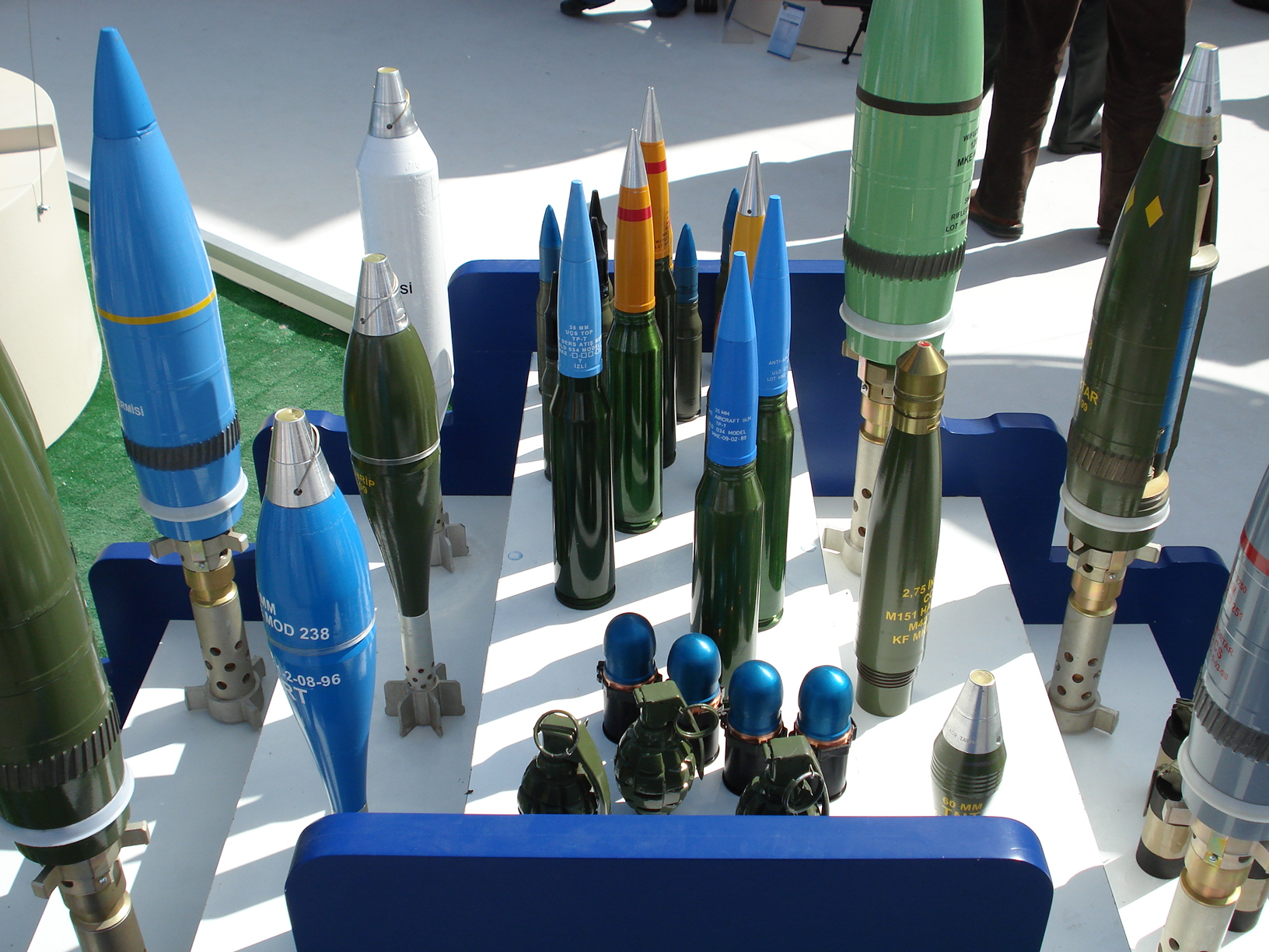 IDEF '07 Savunma Fuarı'nda çekildi.23 Mayıs 2007